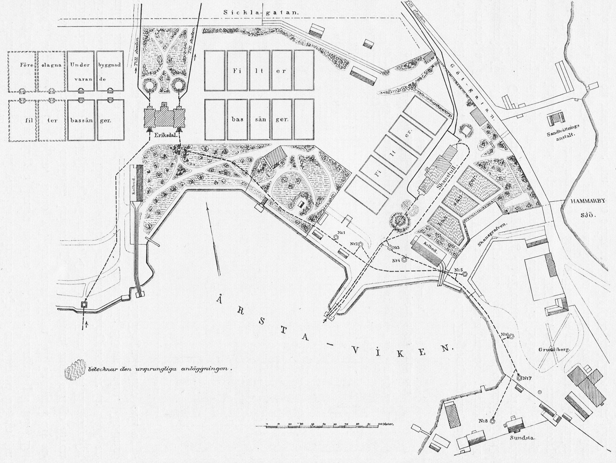 Plan över Skanstullsverket och Eriksdalsverket